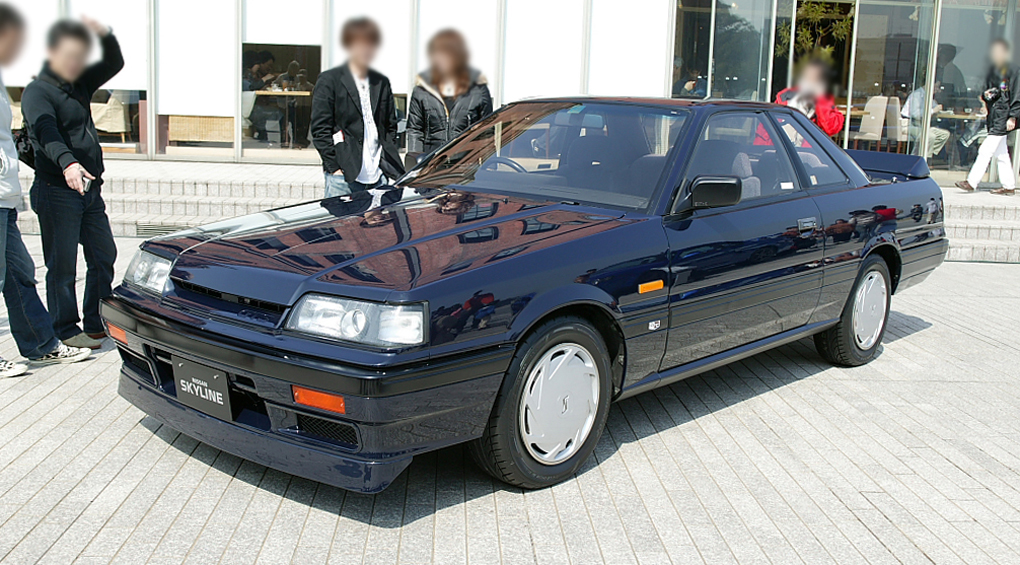 Nissan Skyline Coupe GTS-R